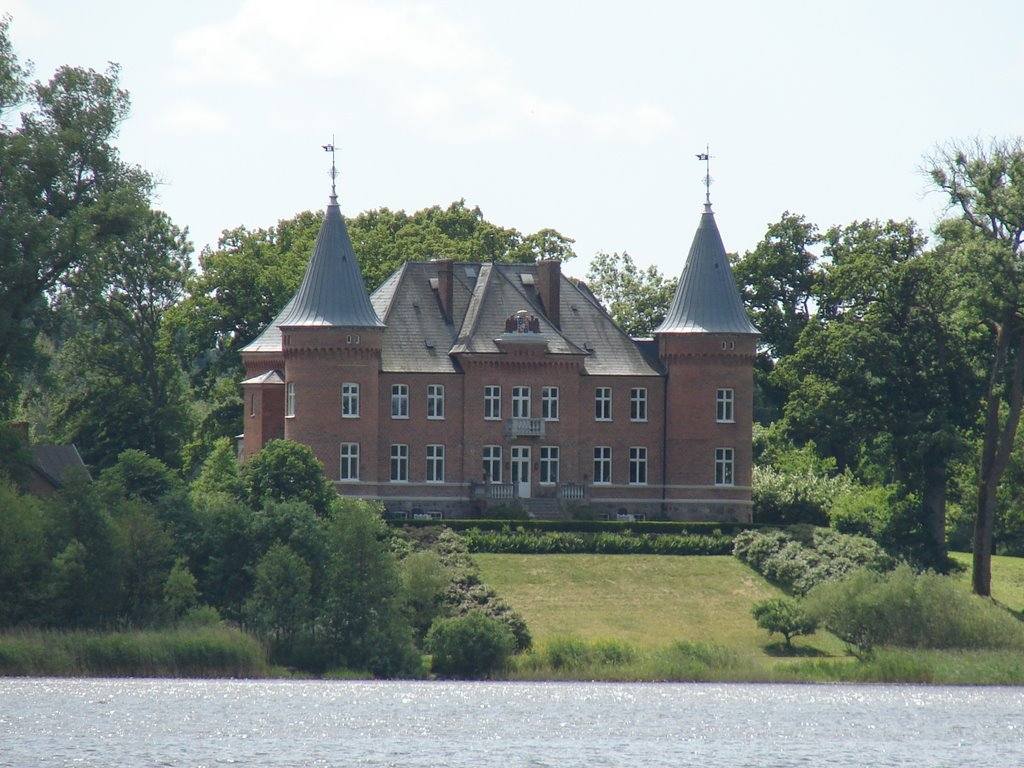 Kvesarums Slott